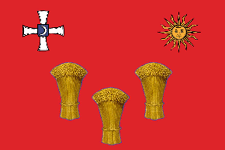 прапор Тульчинського району